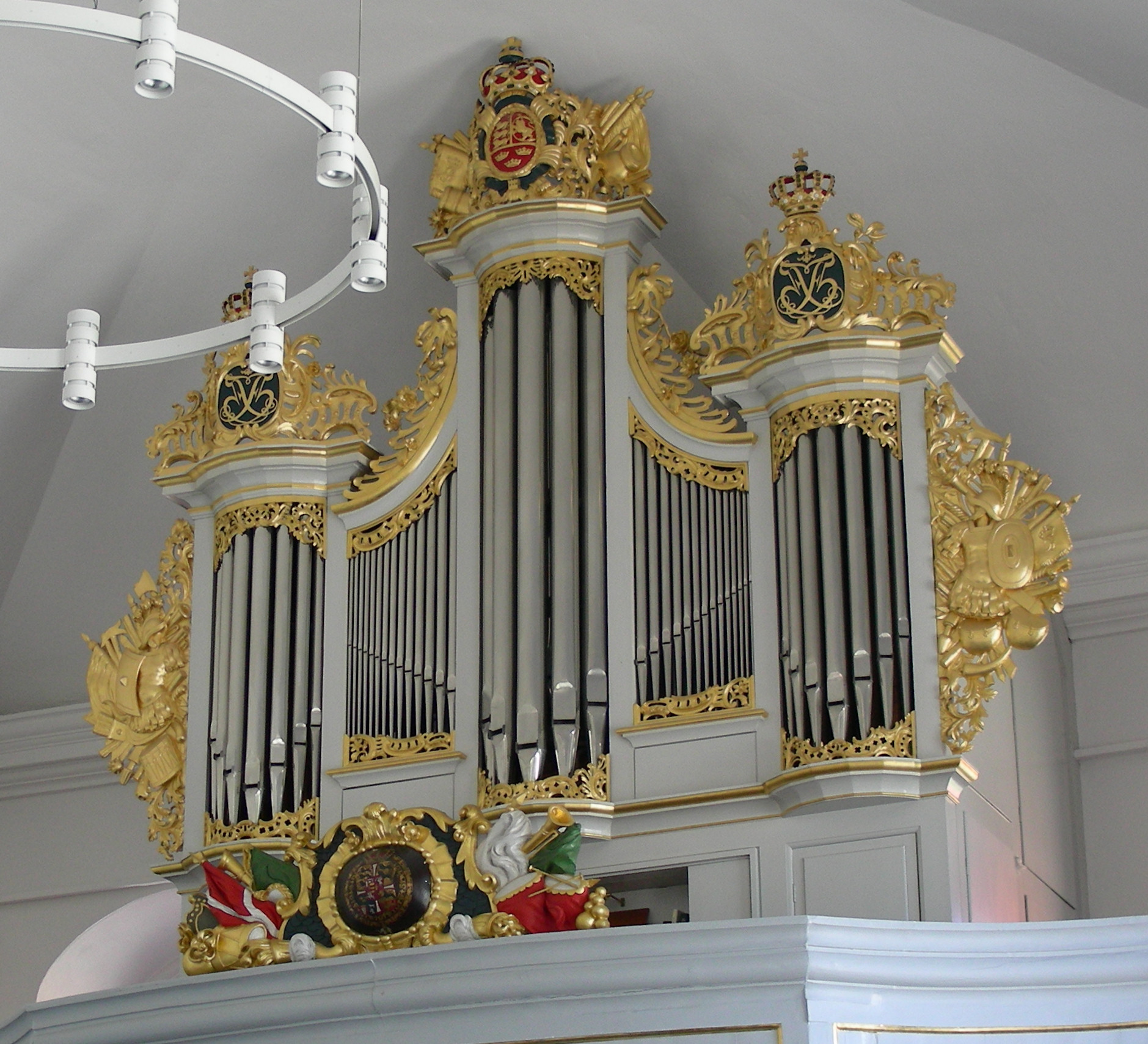 Kastelskirken (Citadel Church), Copenhagen, Denmark. Organ.